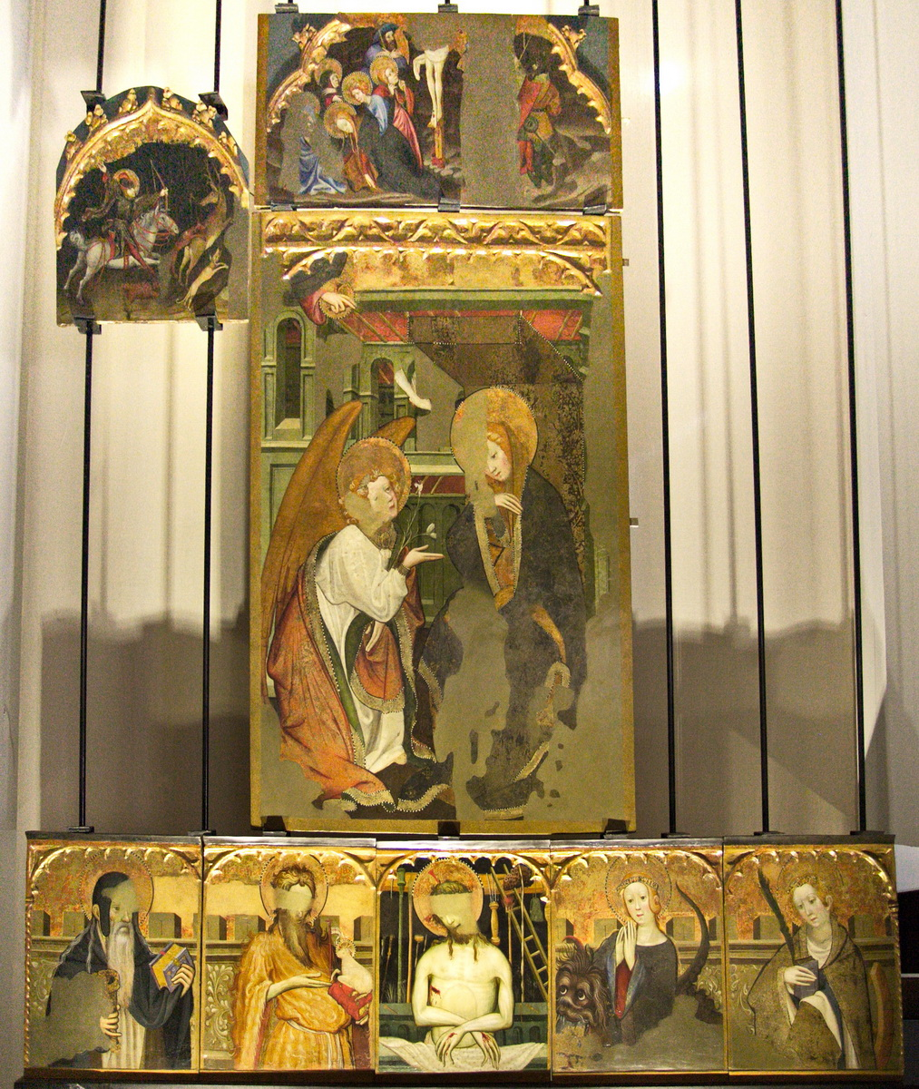 Retaule de l'Anunciació, obra de Joan Mates (1410). Pinacoteca Nacional de Cagliari (Sardenya)